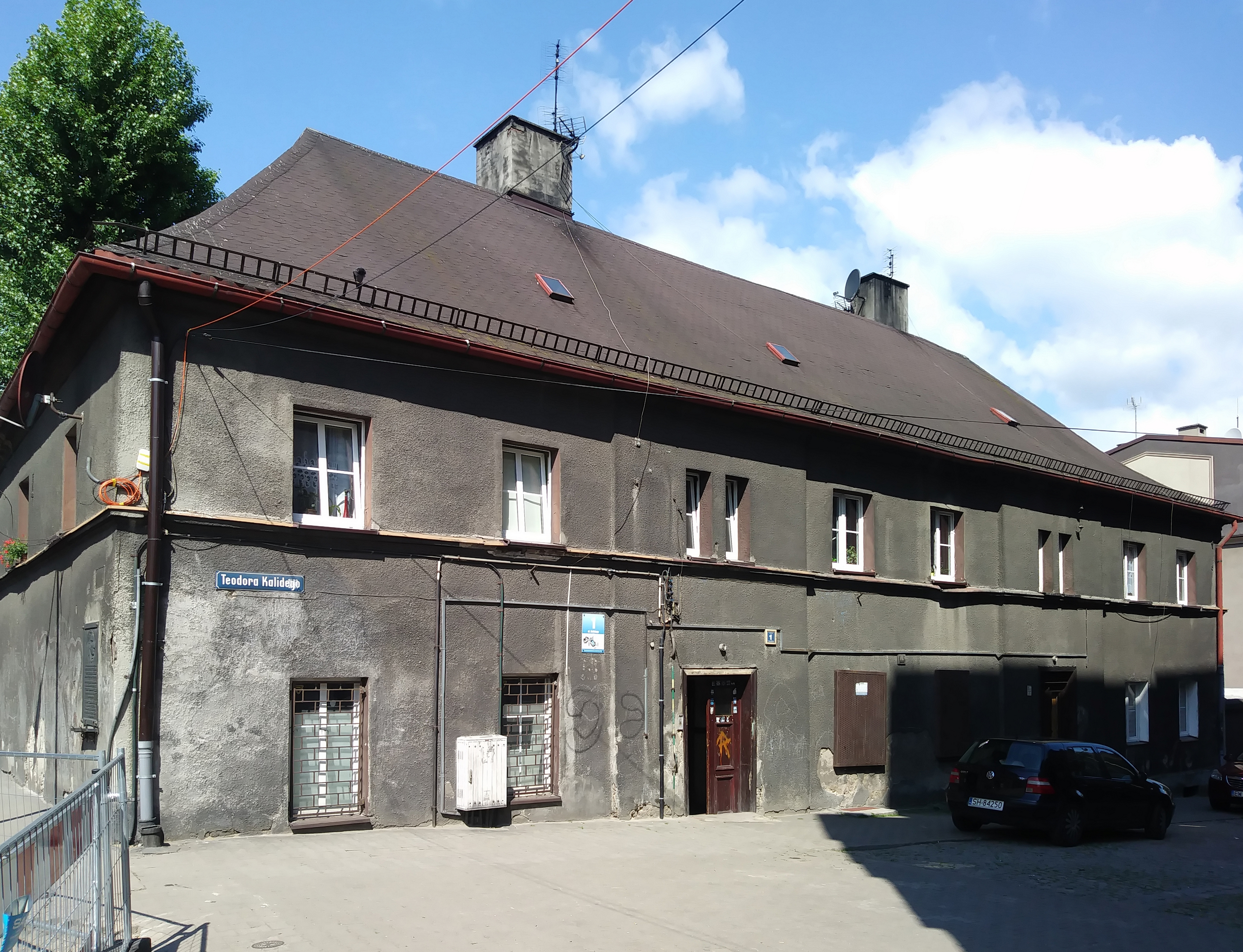 elewacja wschodnia domu Kalidego w Chorzowie, ul. Kalidego 1